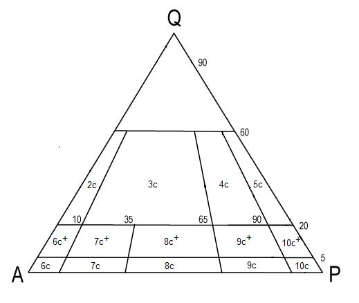 Diagram QAPF z zaznaczonymi polami odpowiadającym poszczególnym czarnokitom. 1- czarnokit 2- opdalit 3- enderbit 4- mangeryt 5- jotumit